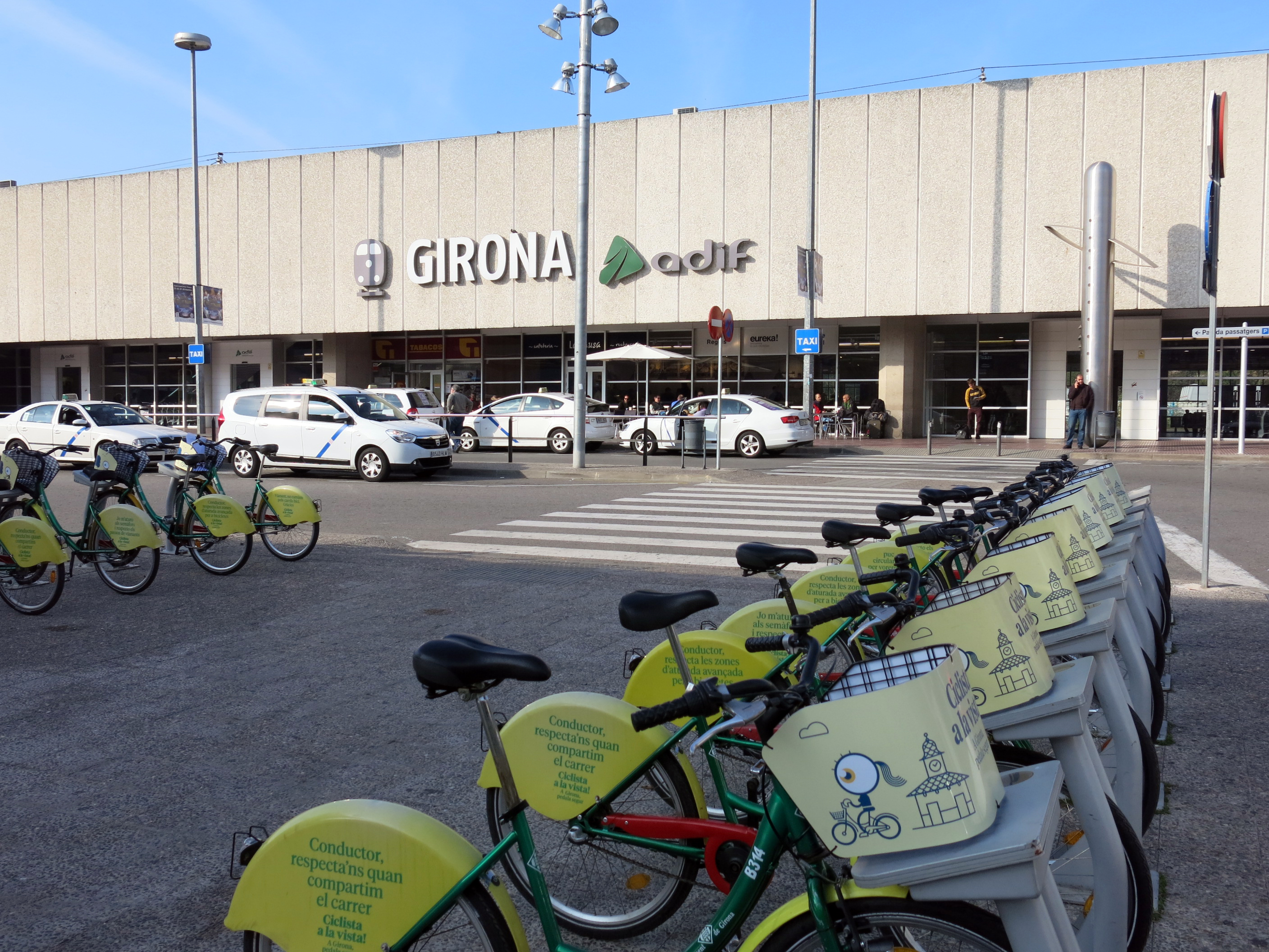 Estació de ferrocarril de Girona, pl. Espanya, i parada de la Girocleta